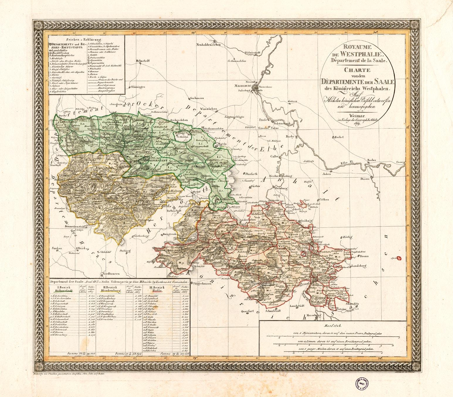 Charte von dem Departement der Saale des Königreichs Westpahlen